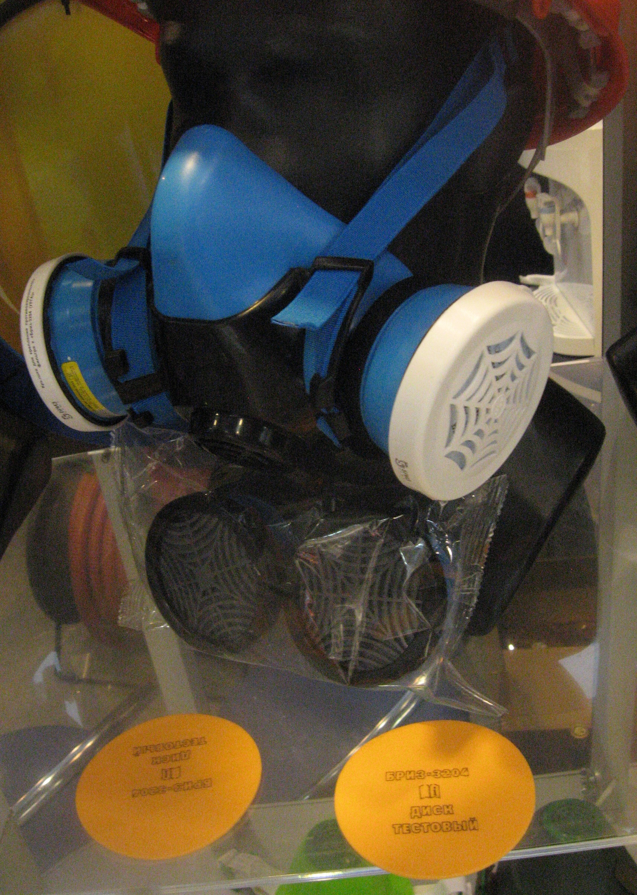 Фото с выставки СИЗ и спецодежды (БИОТ-2019). Средство индивидуальной защиты органов дыхания.